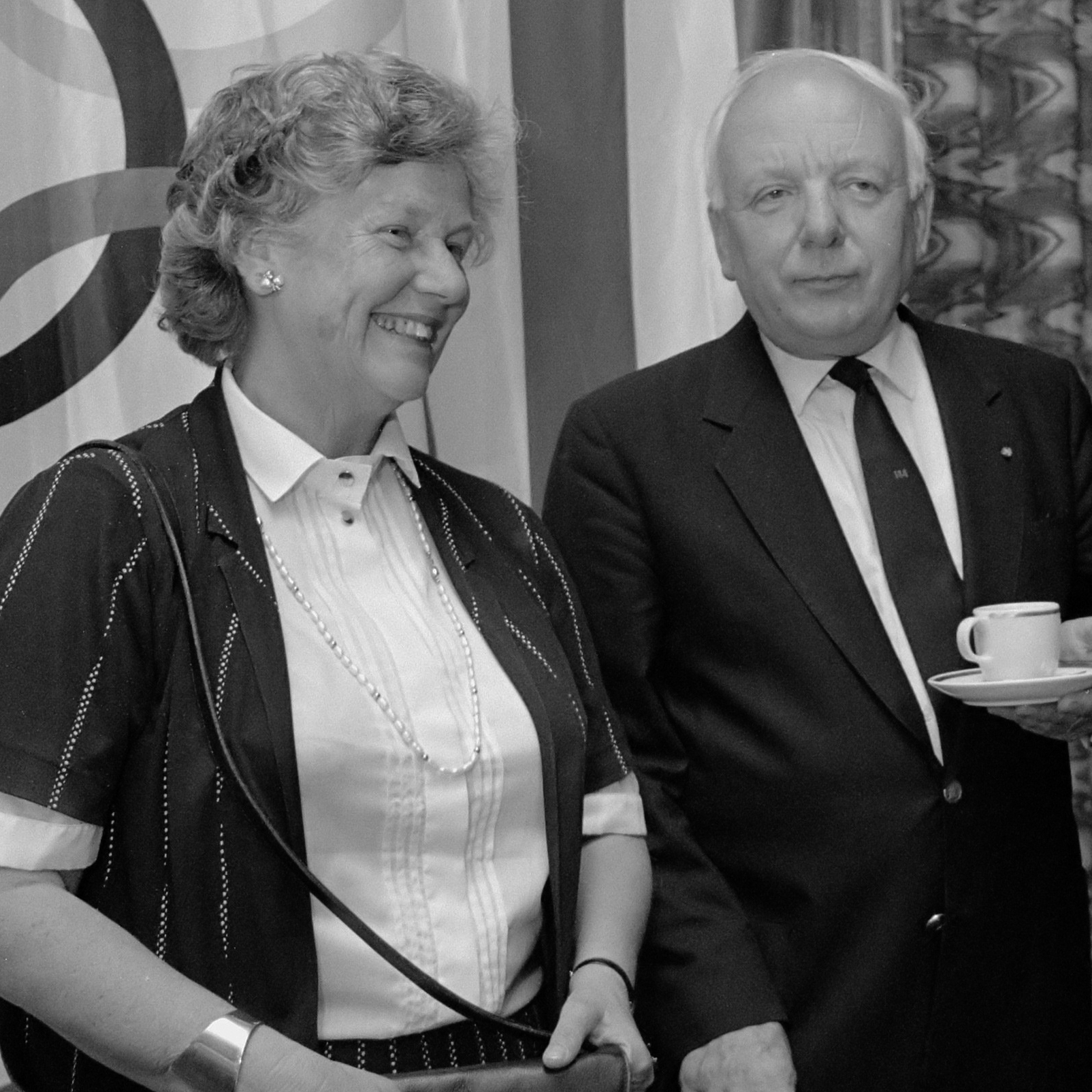 Benoeming van het nieuwe bestuur van het Nederlands Olympisch Comité (NOC) in Den Haag; v.l.n.r. interim-voorzitter Anneke le Coultre, de nieuwe voorzitter Koos Idenburg en IOC-bestuurder Anton Geesink 29 mei 1989